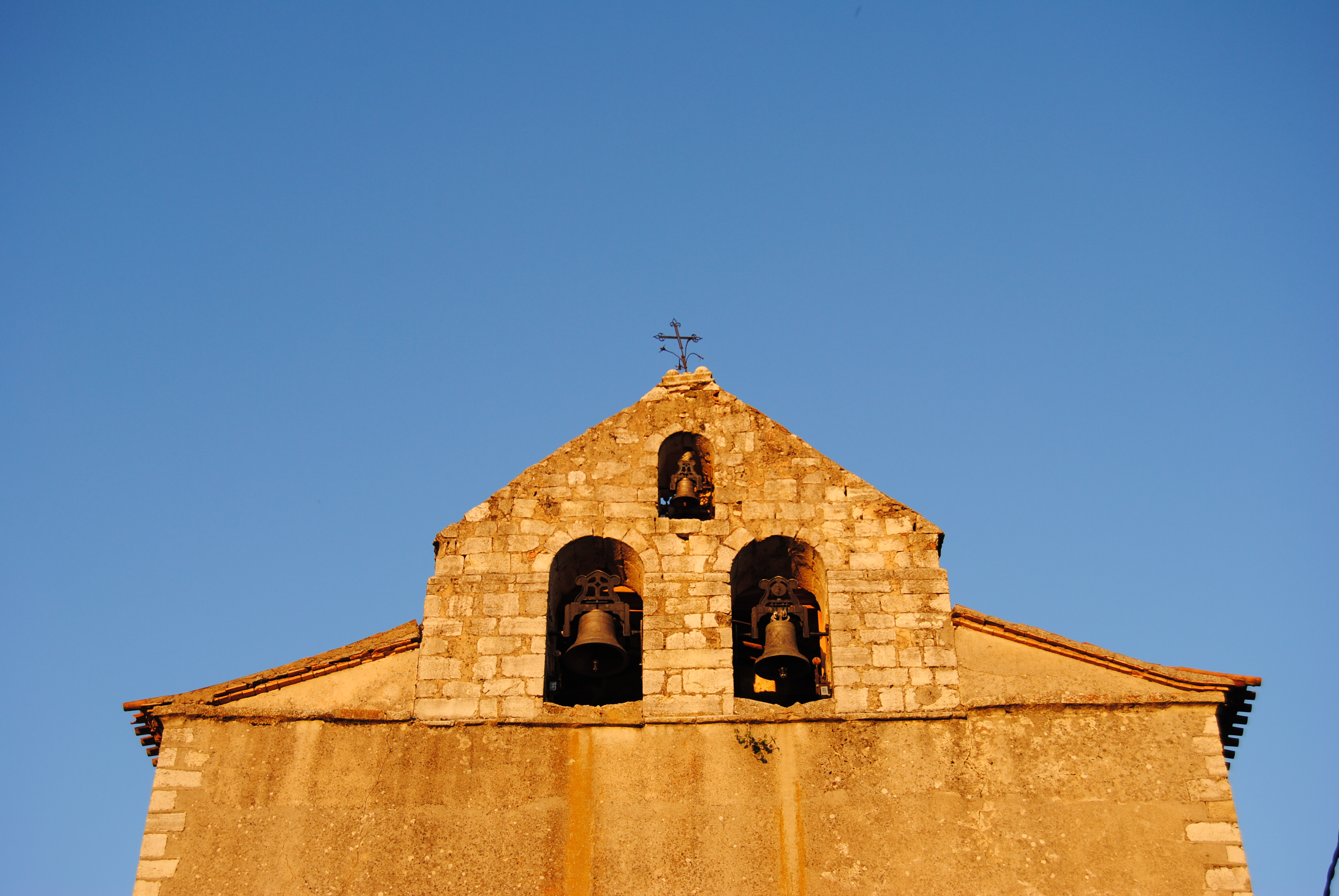 Espadaña de la Iglesia de Nuestra Señora de la Asunción de Valdecabras